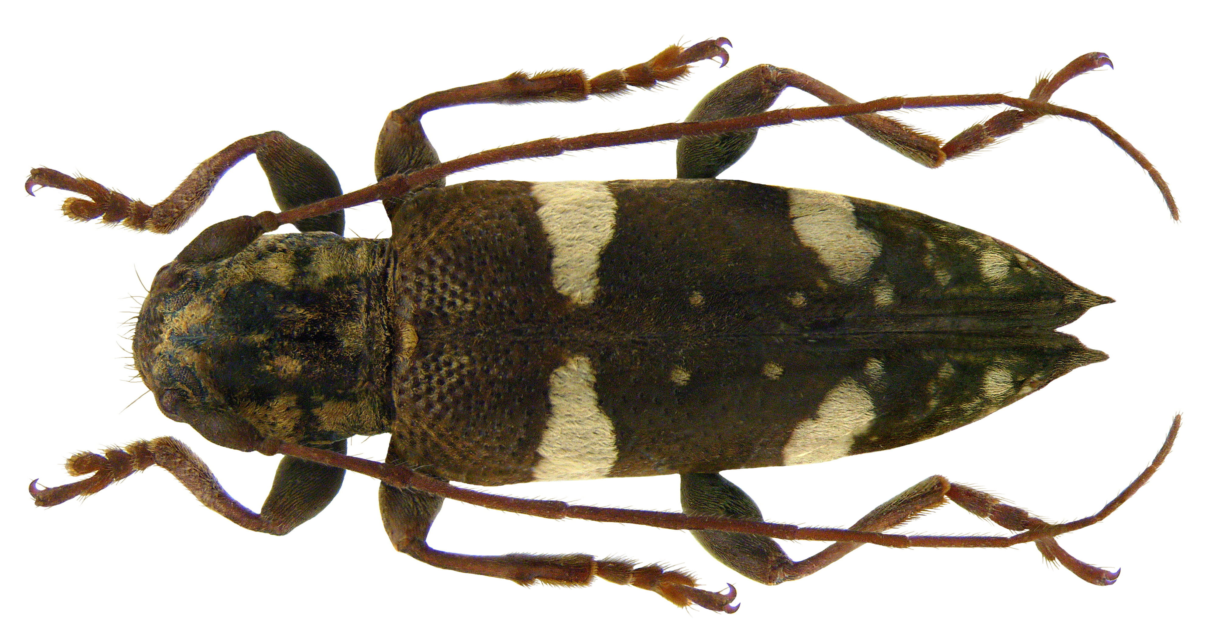 Familie: Cerambycidae Grösse: 11,8 mm Fundort: Philippinen, Prov. Benguet, Baguio leg. P.Baker, 1923; det. Aurivillius, 1923 Type Coll. Museum Dresden Foto: U.Schmidt, 2009